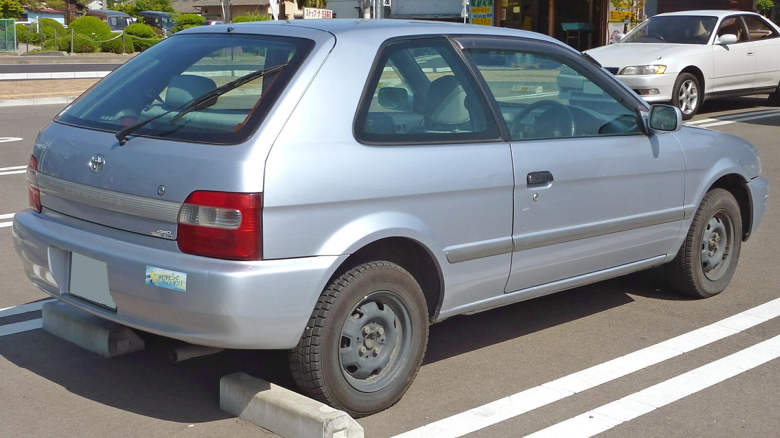 トヨタ・カローラII（4代目・後期型リア）